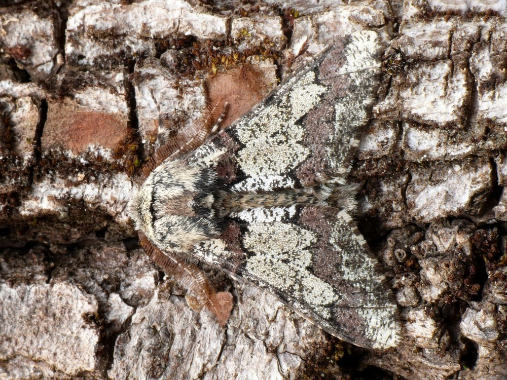 Biston strataria Slovakia, Trenčín - Chocholná-Velčice - večer priletela k svetlu na lesnej ceste vedúcej okrajom starého listnatého lesa